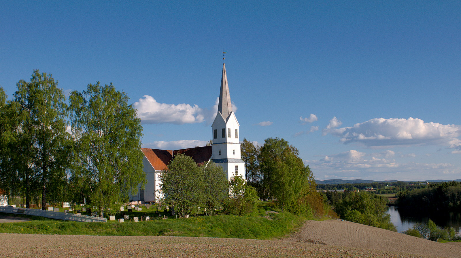 Udenes kirke i Akershus